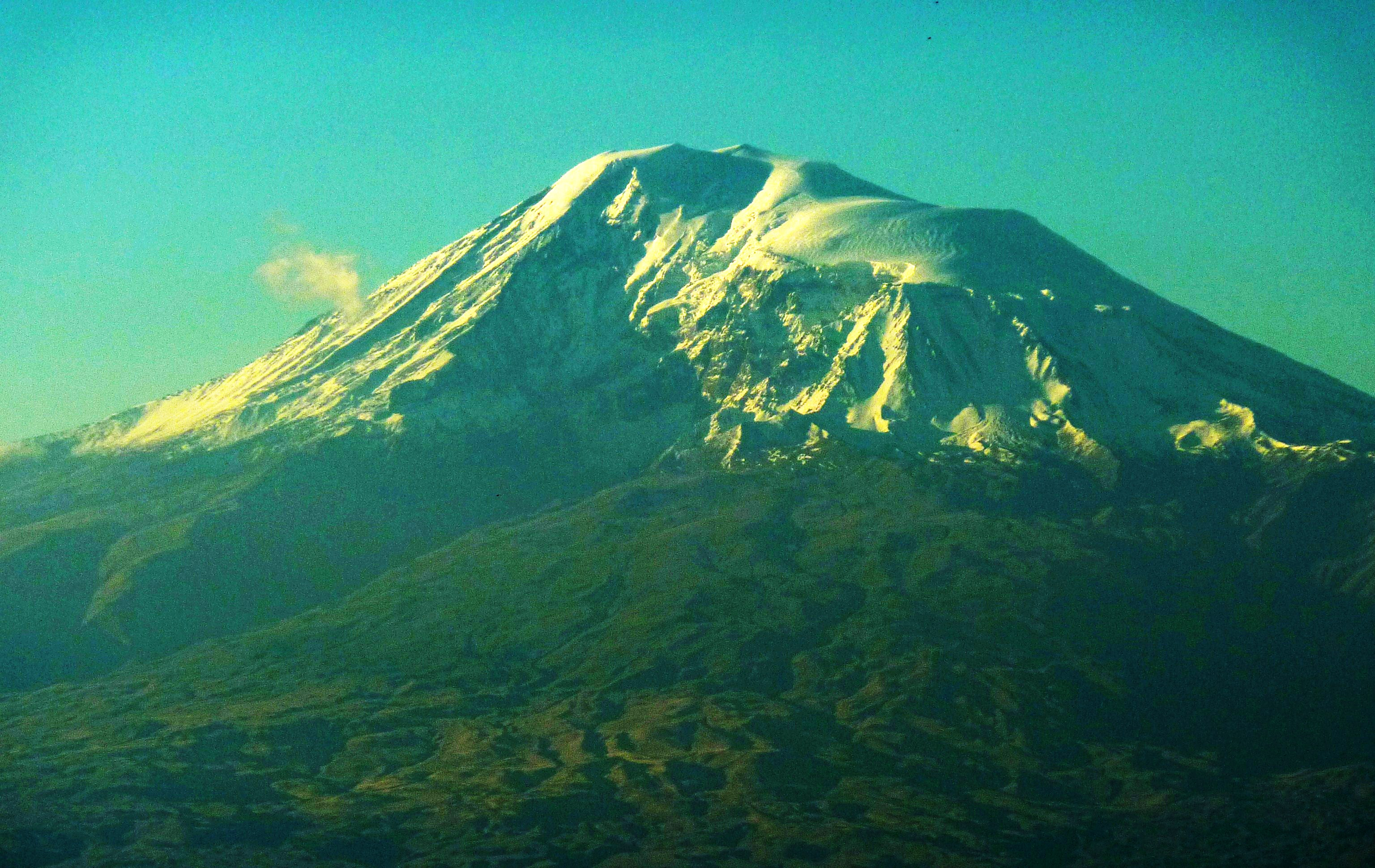 Le mont Ararat (situé dans la Turquie actuelle mais symbole de l'Arménie) vu des environs d'Erevan